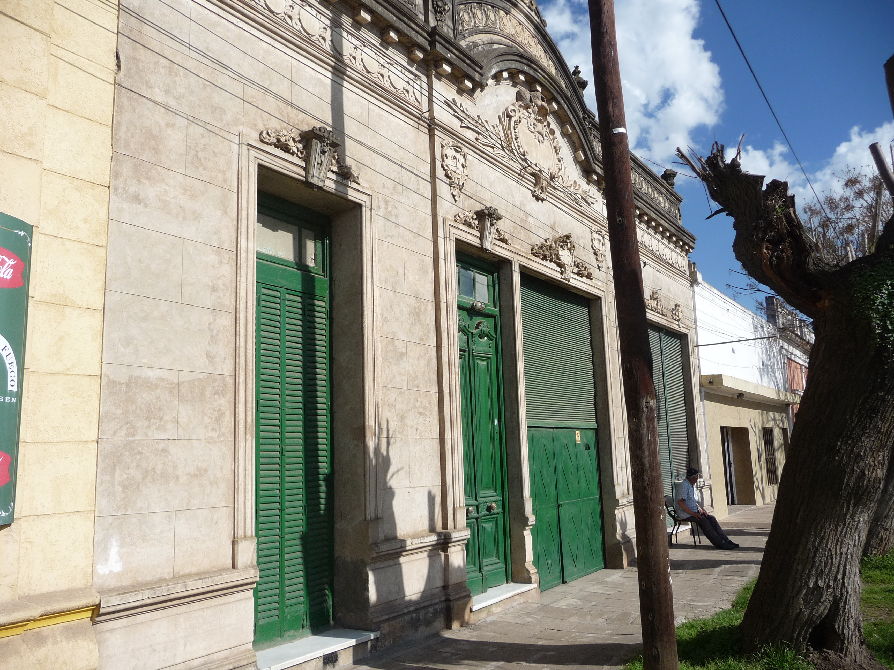 Zona de preservación de Carlos Keen (en su calidad de poblado histórico)